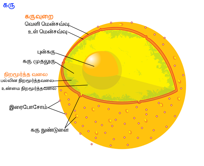 உயிரணுக் கரு